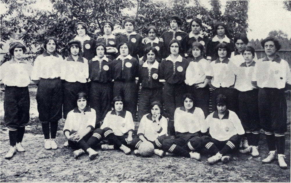 Fútbol femenino español en 1914. Spanish Girl's Club (divisiones del club de Montserrat y Giralda).